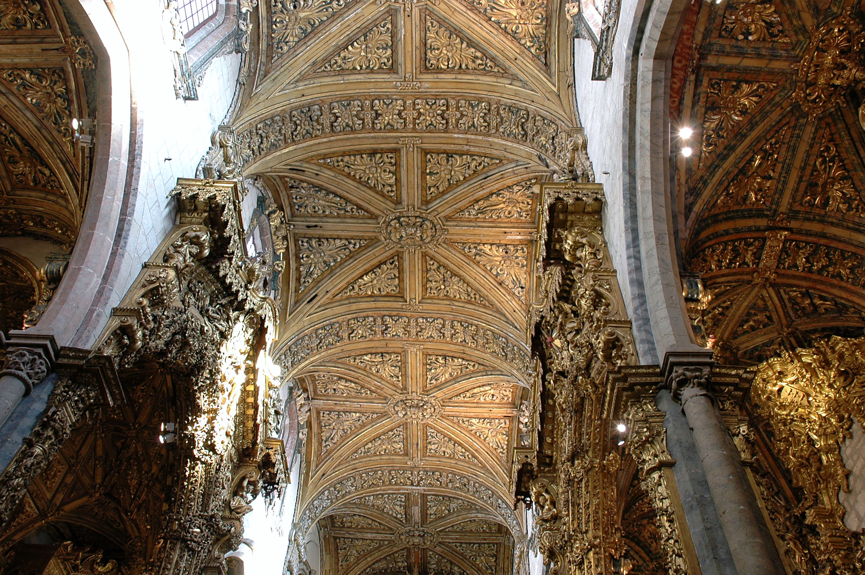 Porto - Església de Sant Francesc -Interior